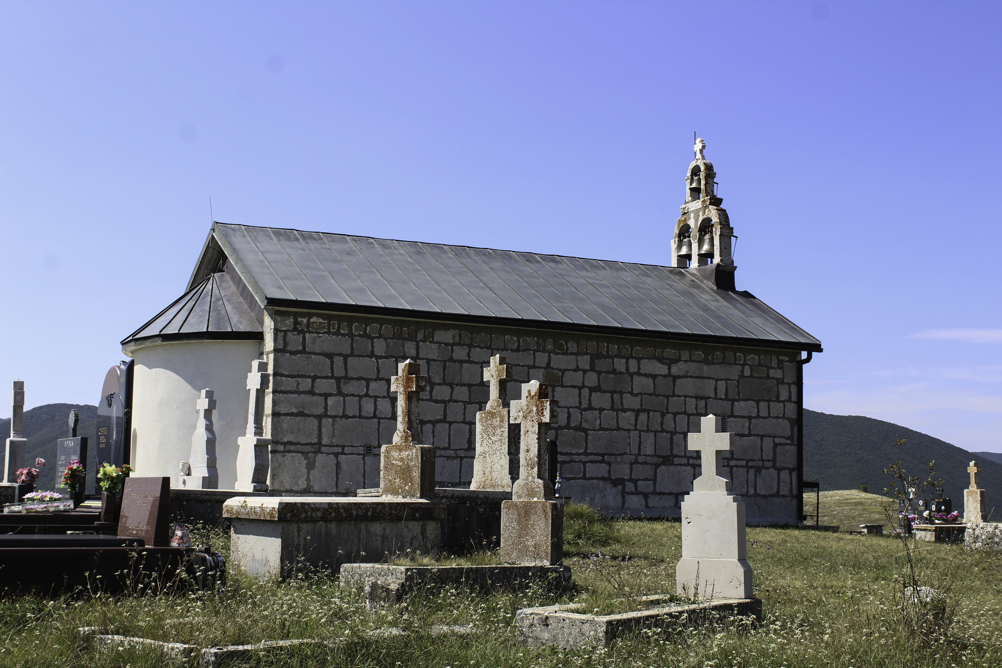 This image was uploaded as part of Trace of Soul 2018. Црква Светог Димитрија - Домрке (Гацко).